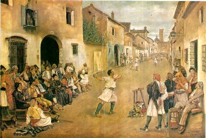 Quadre costumbrista de Josep Bru i Albinyana, on il·lustra el joc de pilota al carrer. Datat de l'any 1881